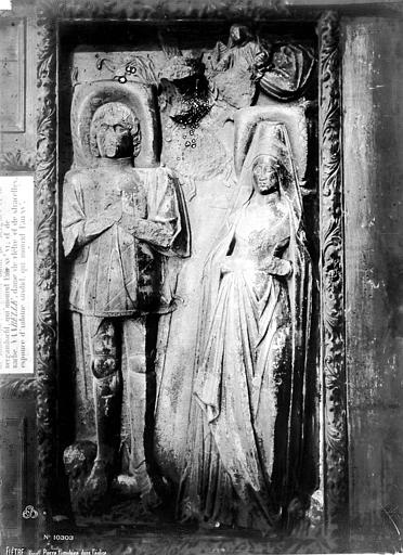 Pierre tombale.